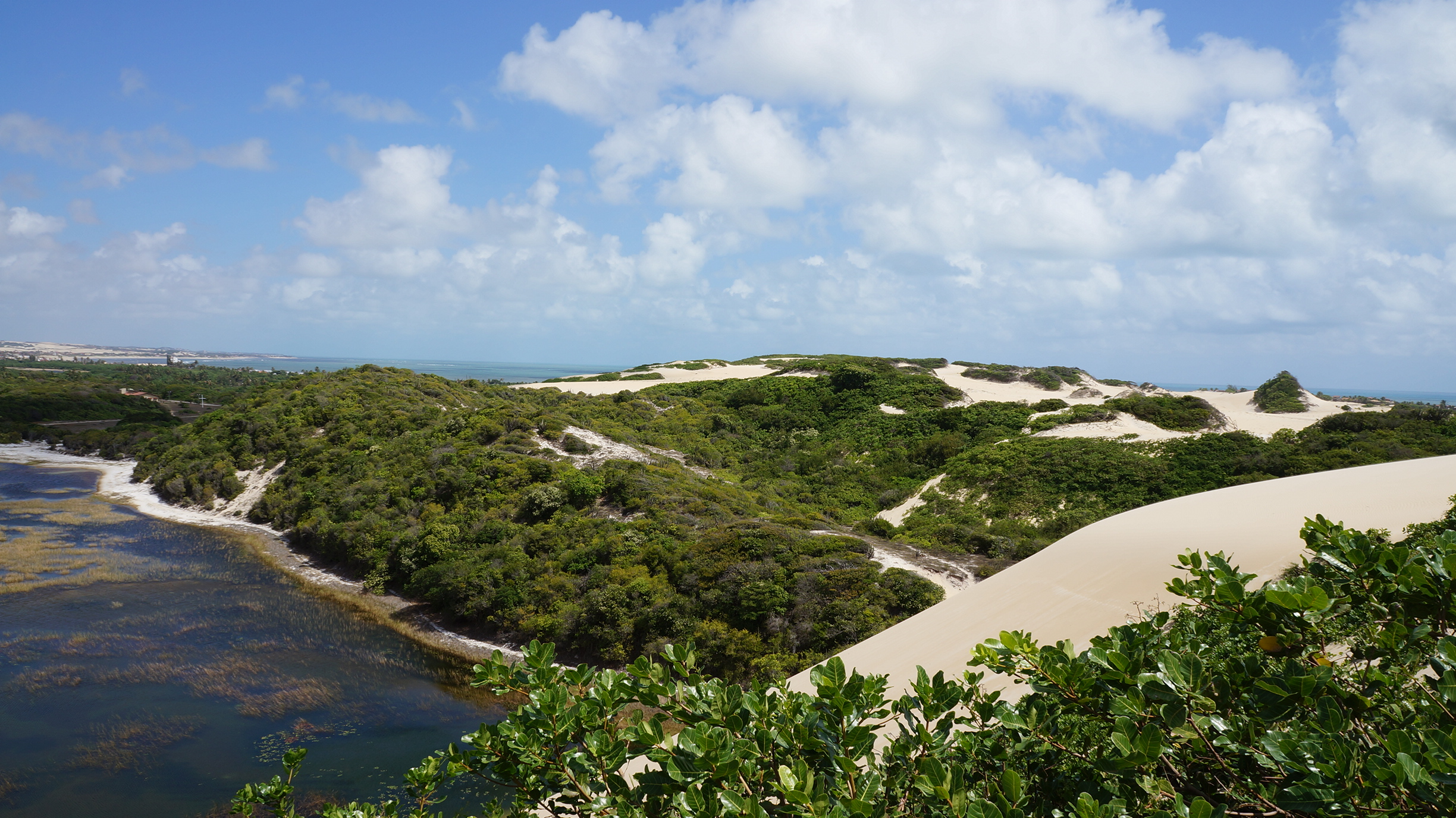 Foto da lagoa na praia de Genipabu-RN